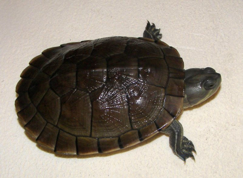 tortue vu de dessus